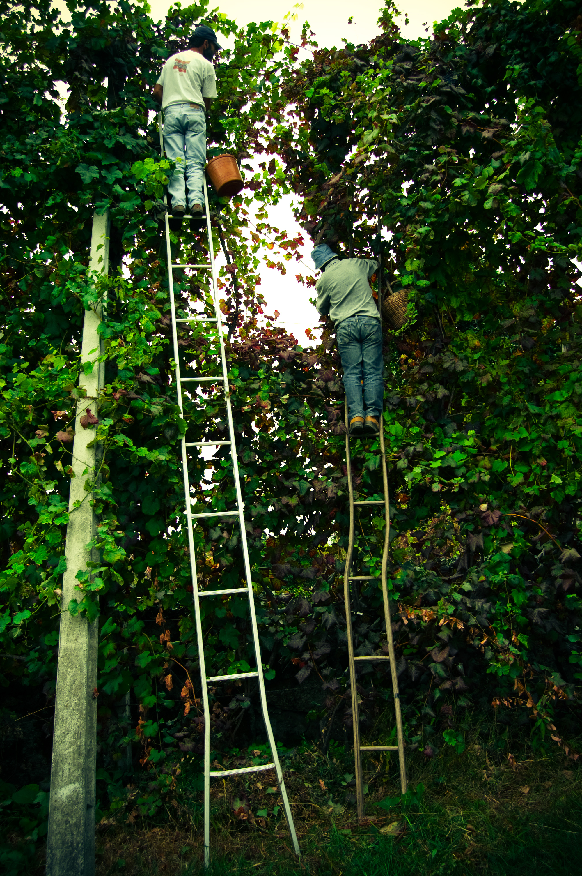 Vindima em Guimarães,Portugal